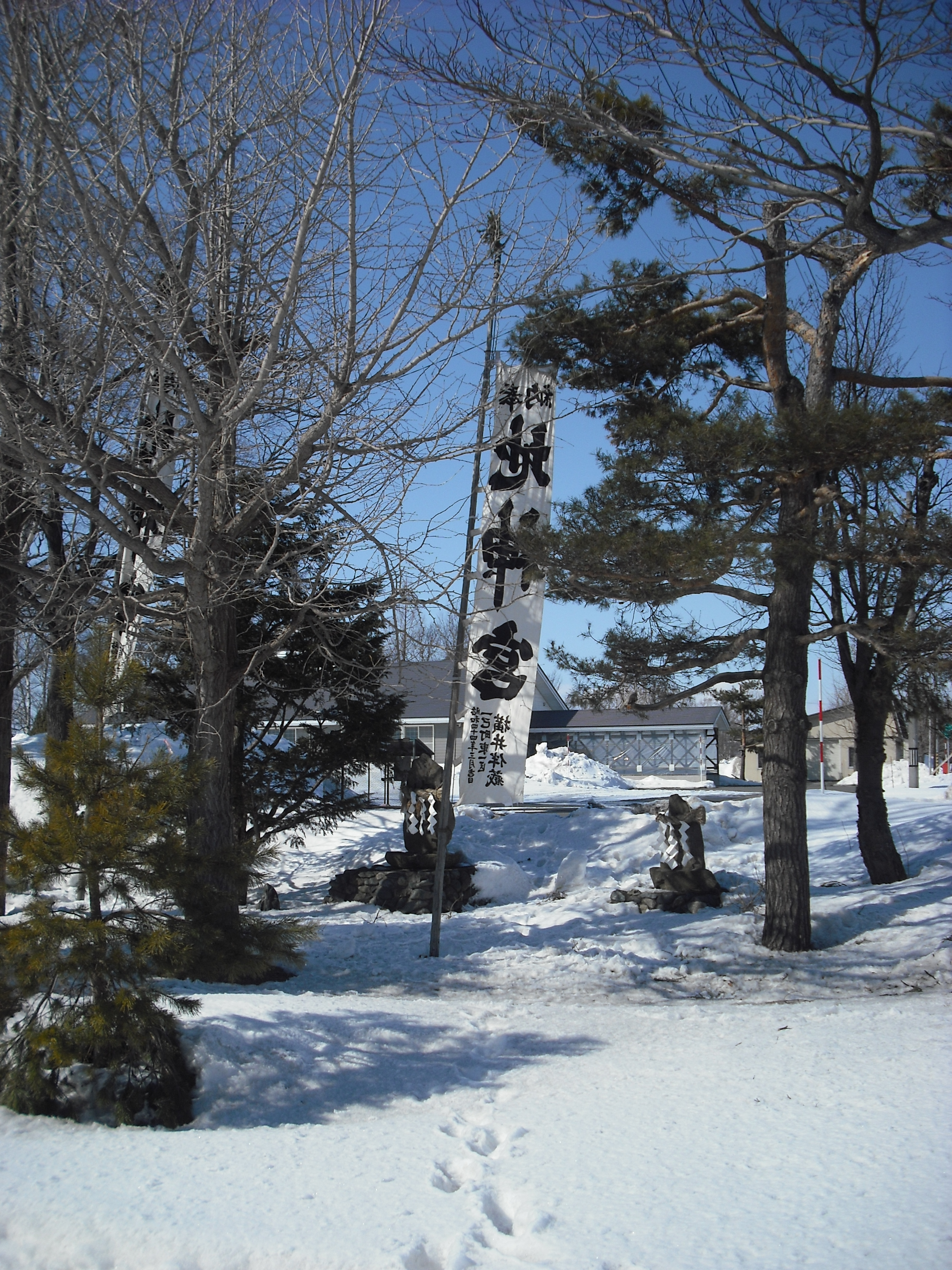 Own workの地鎮祭幟の例、町内会館・自治体指定の場所付近に春先立てられている事が多く、この場にあるしめ縄で飾られた社等で地鎮祭が執り行われる。農家が主に出席する。